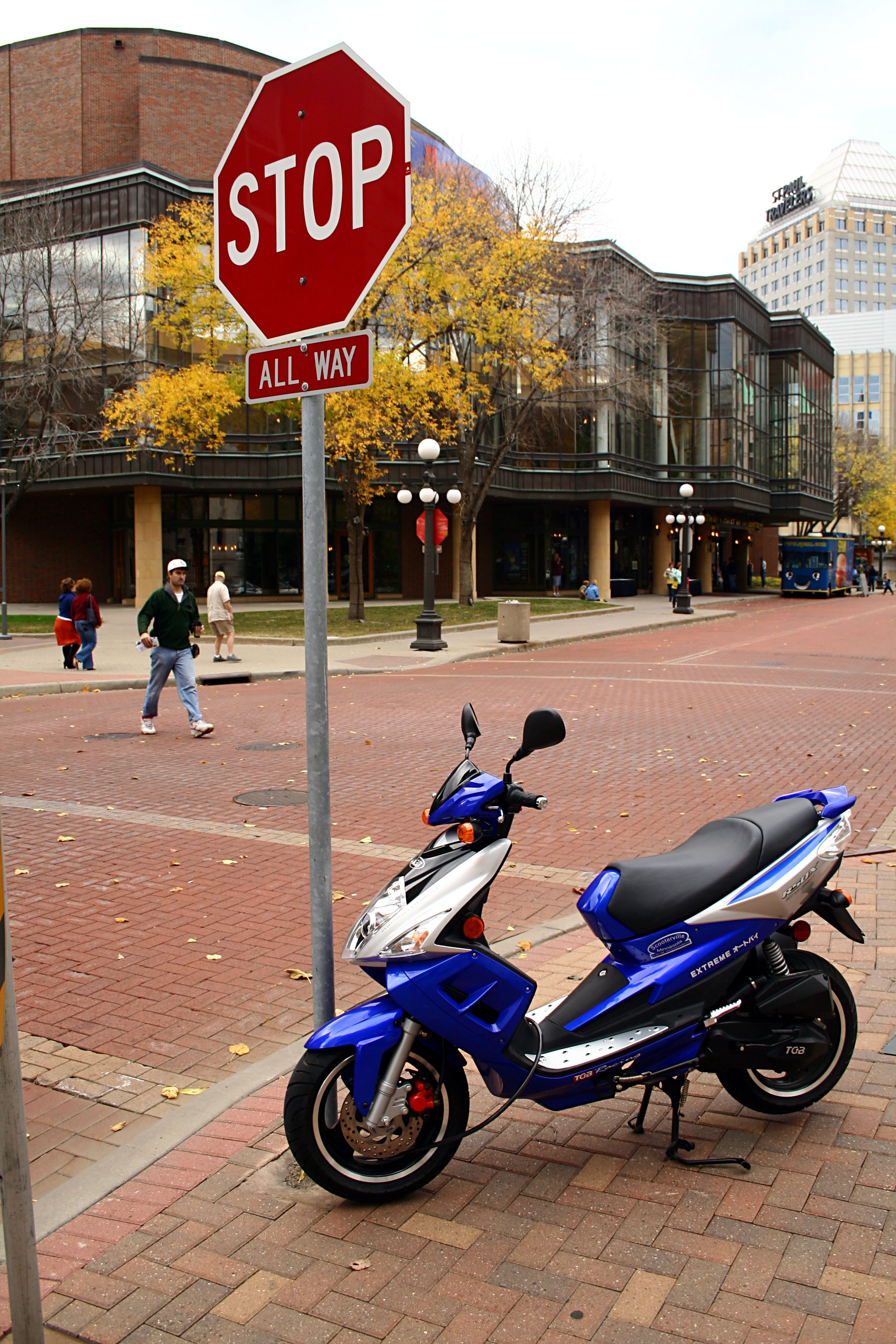 TGB R50X